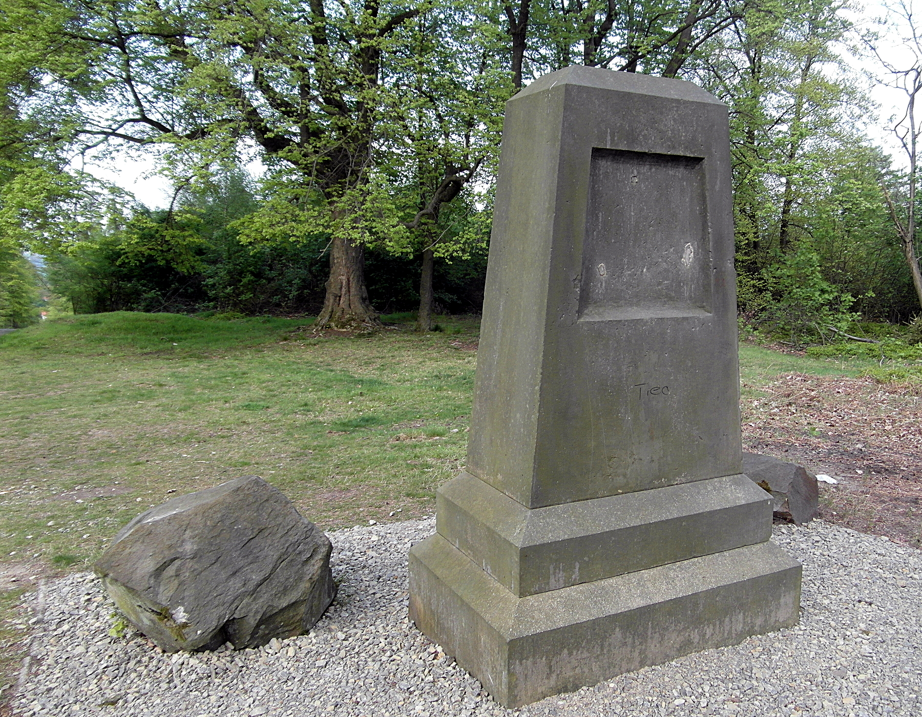 Das als Baudenkmal geschützte Denkmal für Ernst Brauns im Deister bei Barsinghausen nach der Sanierung im Frühjahr 2017